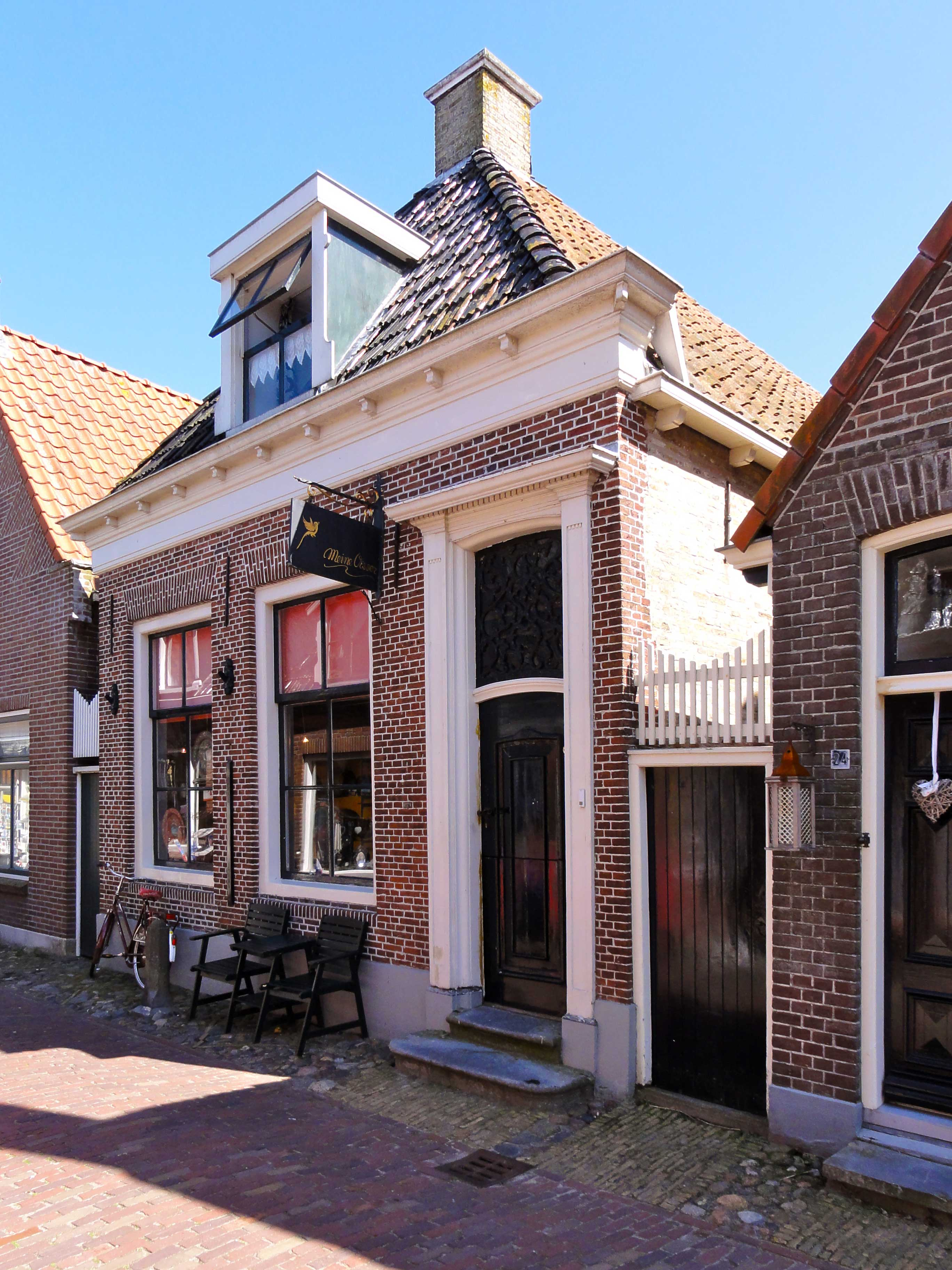 Buren 26 te Hindeloopen